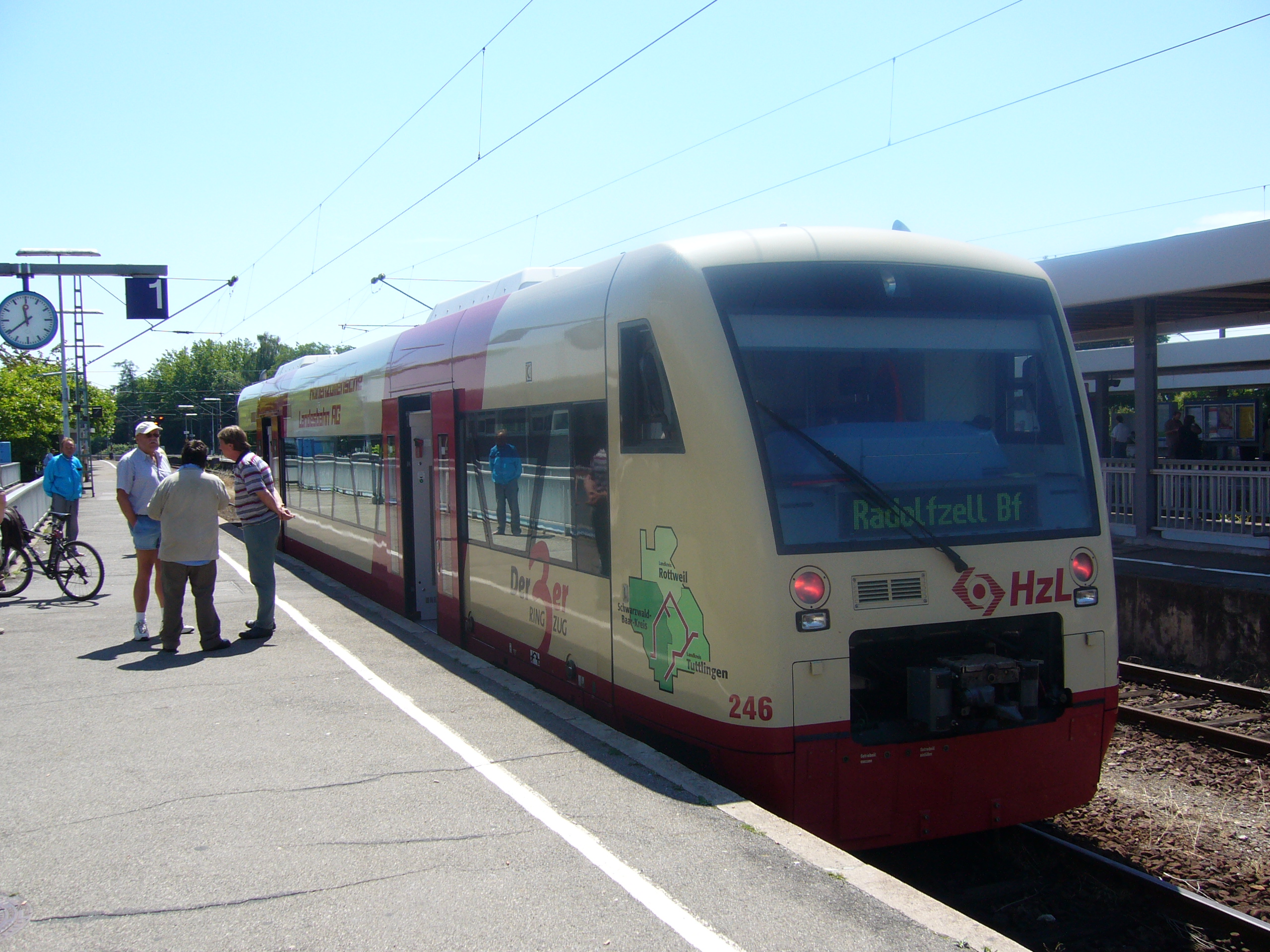 Regio-Shuttle des Ringzugs auf dem Seehäsle im Bahnhof Radolfzell